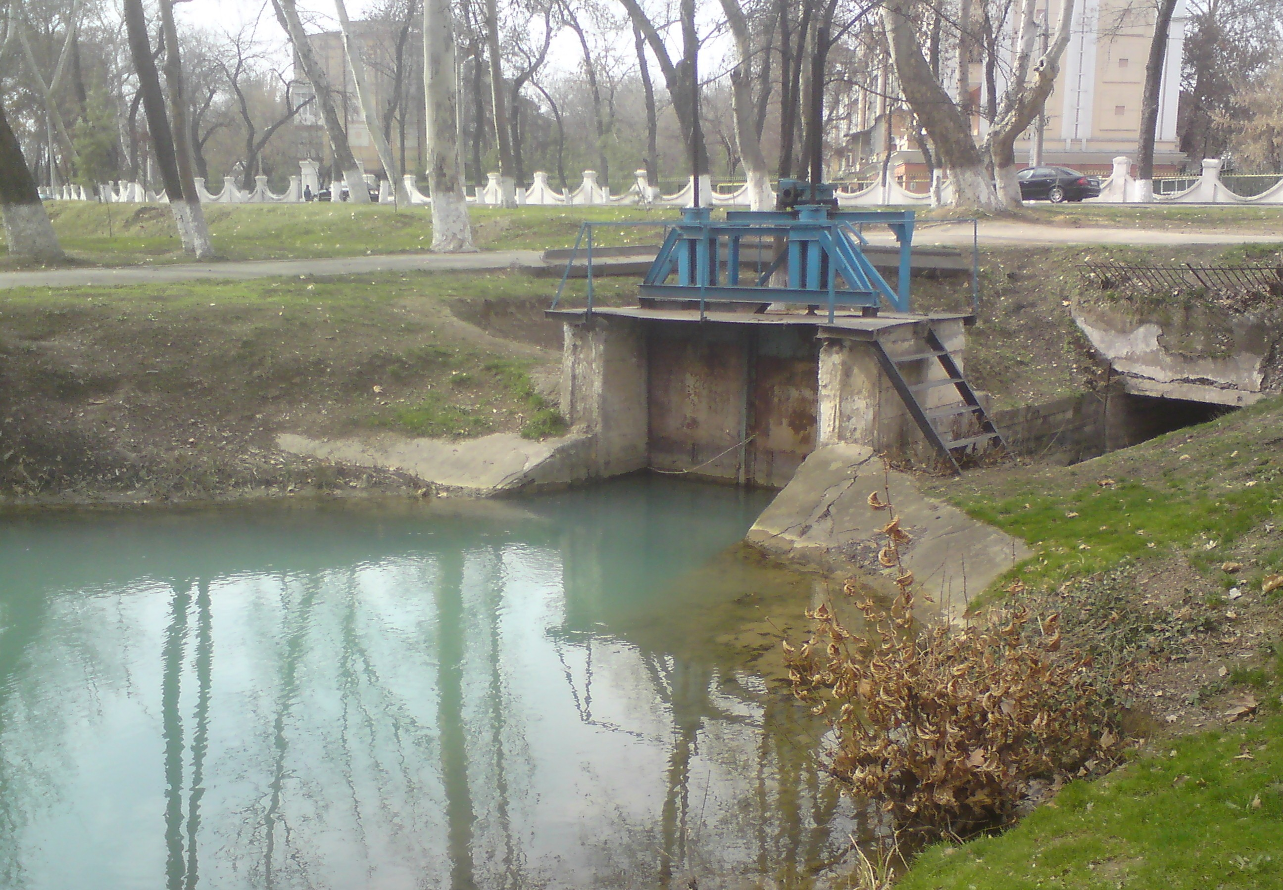 Канал Анхор, резко упавший в полноводности, после отхода от него канала Бурджар, г. Ташкент. Согласно другим представлениям, Анхор начинается только в этой точке (а вышележащий участок относится к каналу Бозсу).